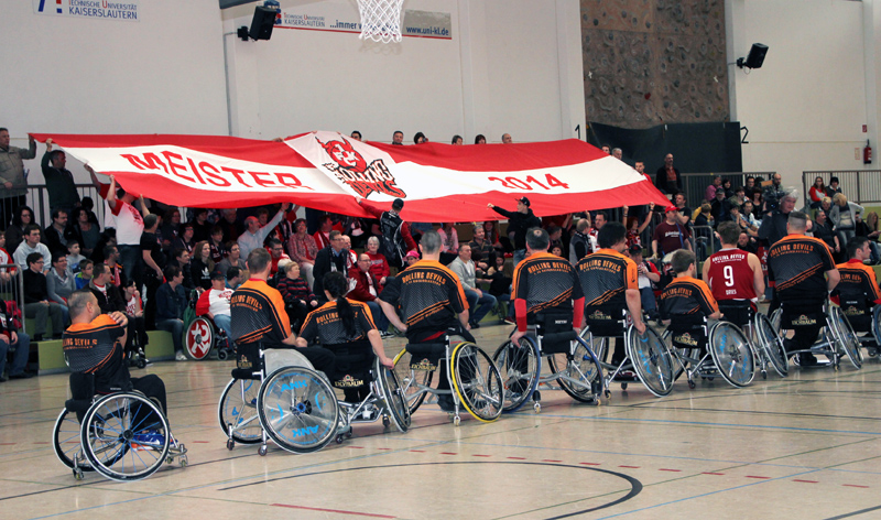 Fanchoreographie zur Zweitligameisterschaft 2014